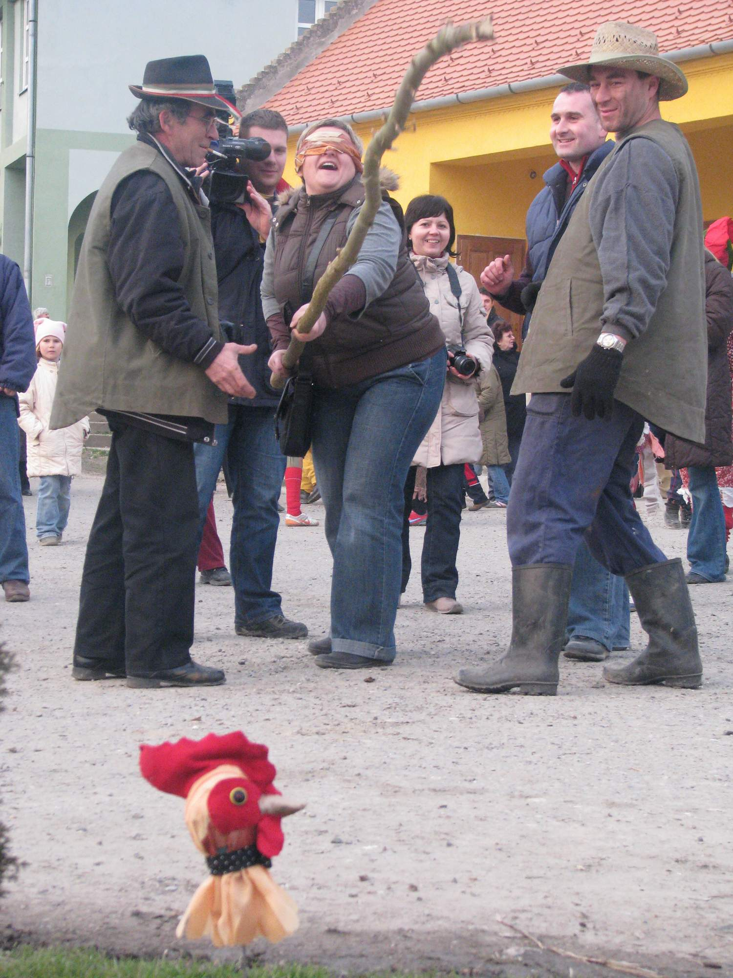 mađarski narodni običaj Kakasütés, Vardarac